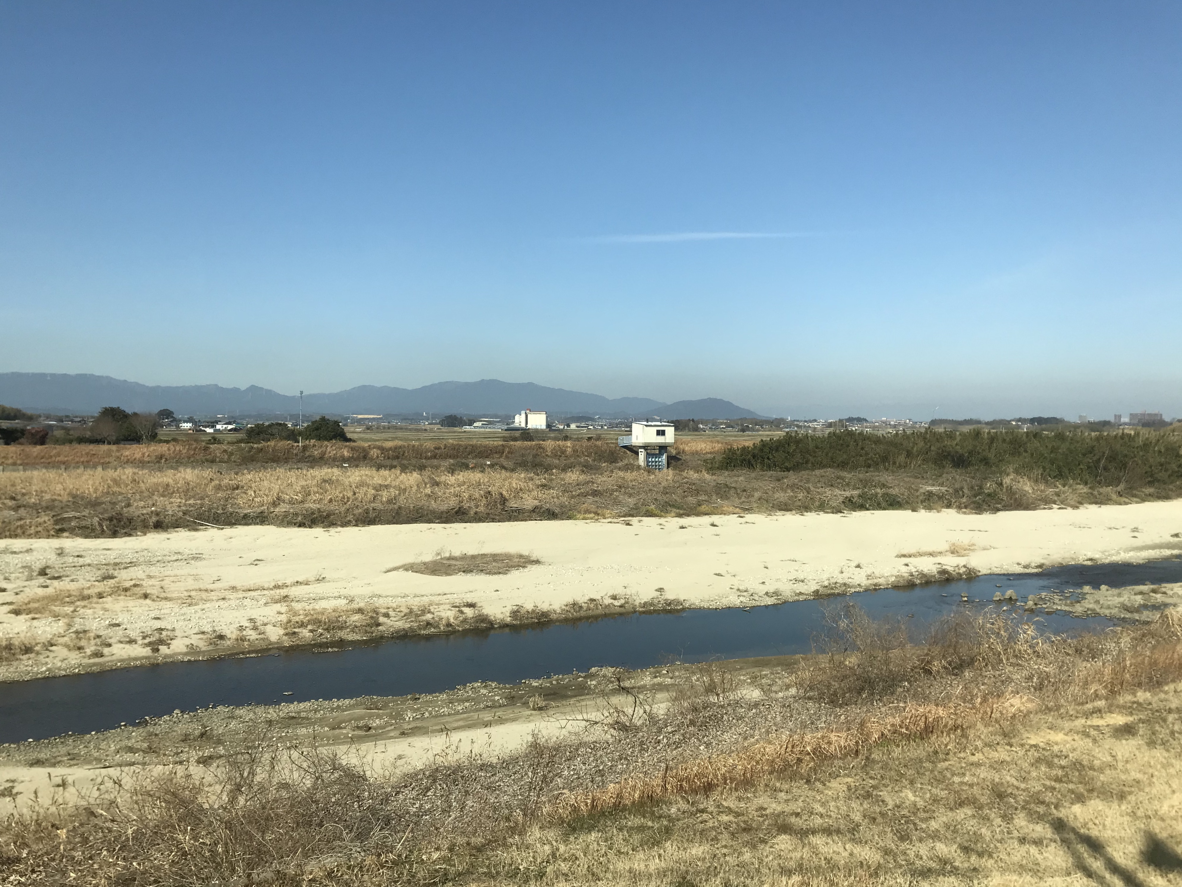 中川短絡線の列車内より望む中村川